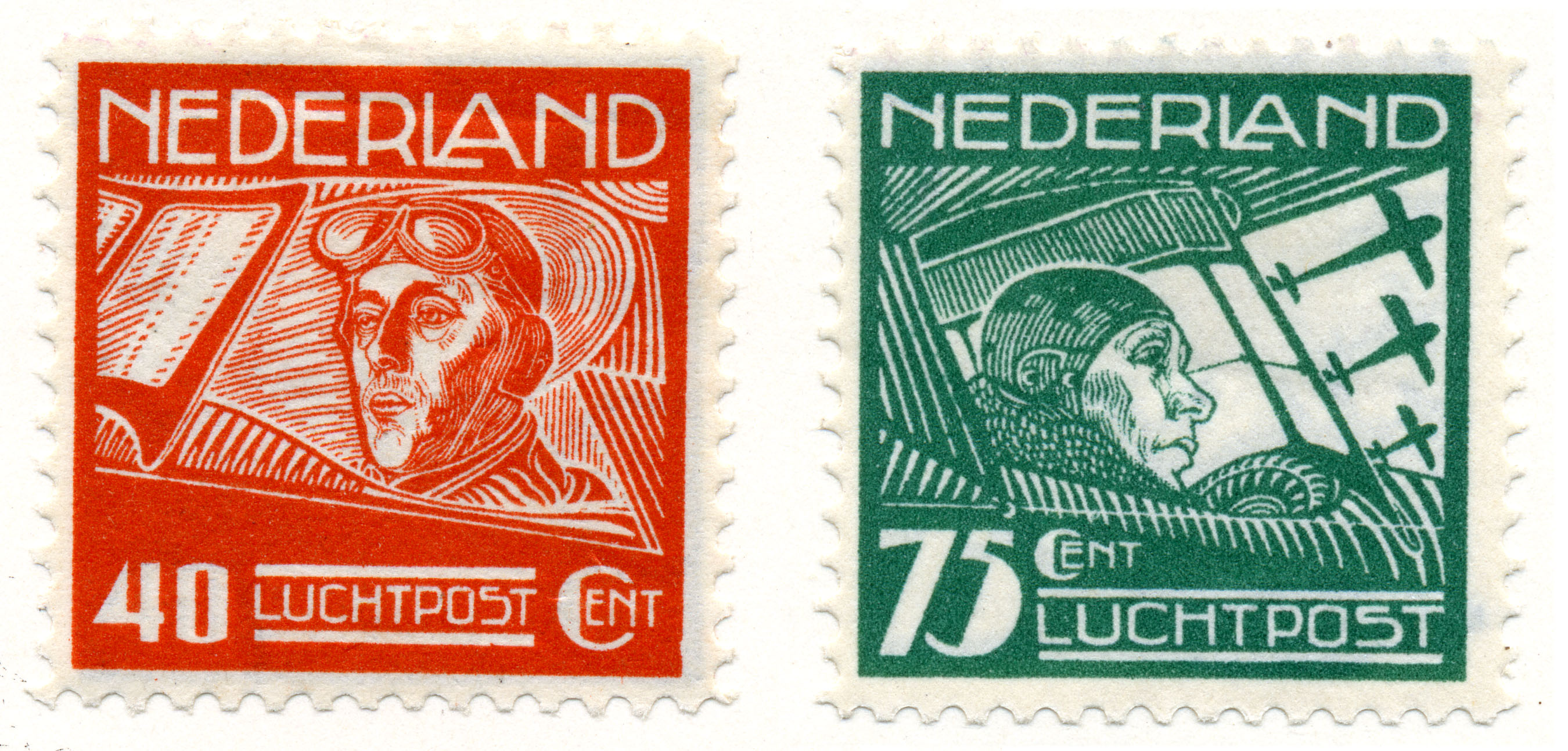 1928 luchtpostzegels met beeltenis van G.A. (George) Koppen, bekend door de postvlucht Nederland-Ned.Indië en terug in 1927 en A.N.J. Thomassen à Thuessink van der Hoop, bekend door de eerste postvlucht Nederland-Ned.Indië in 1924. Ontwerper Chris Lebeau